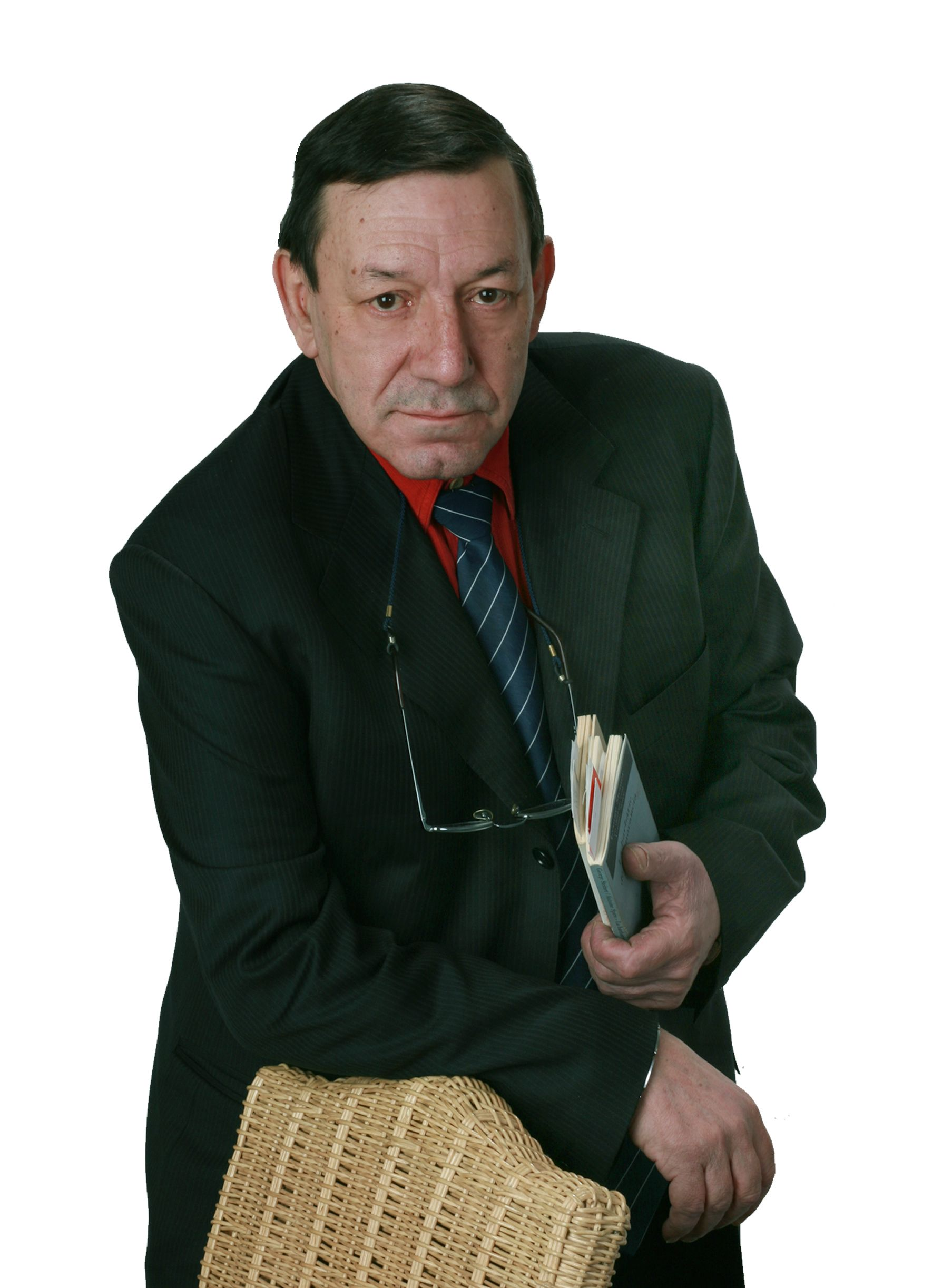 Antoni Morell i Mora. Escriptor andorrà.